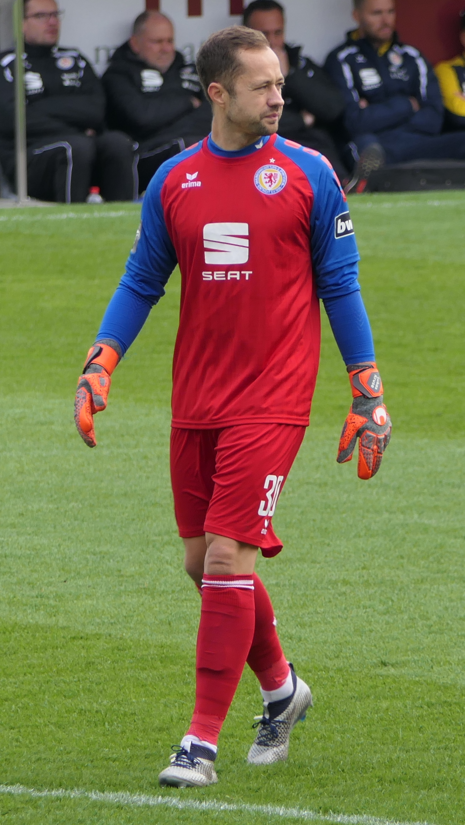 Der Fussballprofi Lukas Kruse im Trikot von Eintracht Braunschweig beim Auswärtsspiel bei der SG Sonnenhof Großaspach am 03.11.2018.